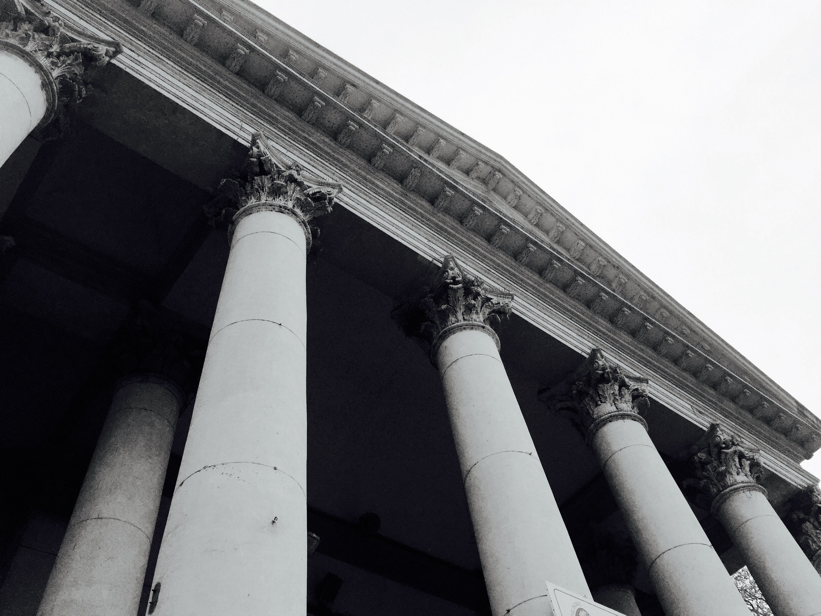 Iglesia Imaculada Concepción Belgrano Iglesia La redonda Belgrano